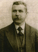 Turkish painter Ahmet Ziya Akbulut (1869-1938)